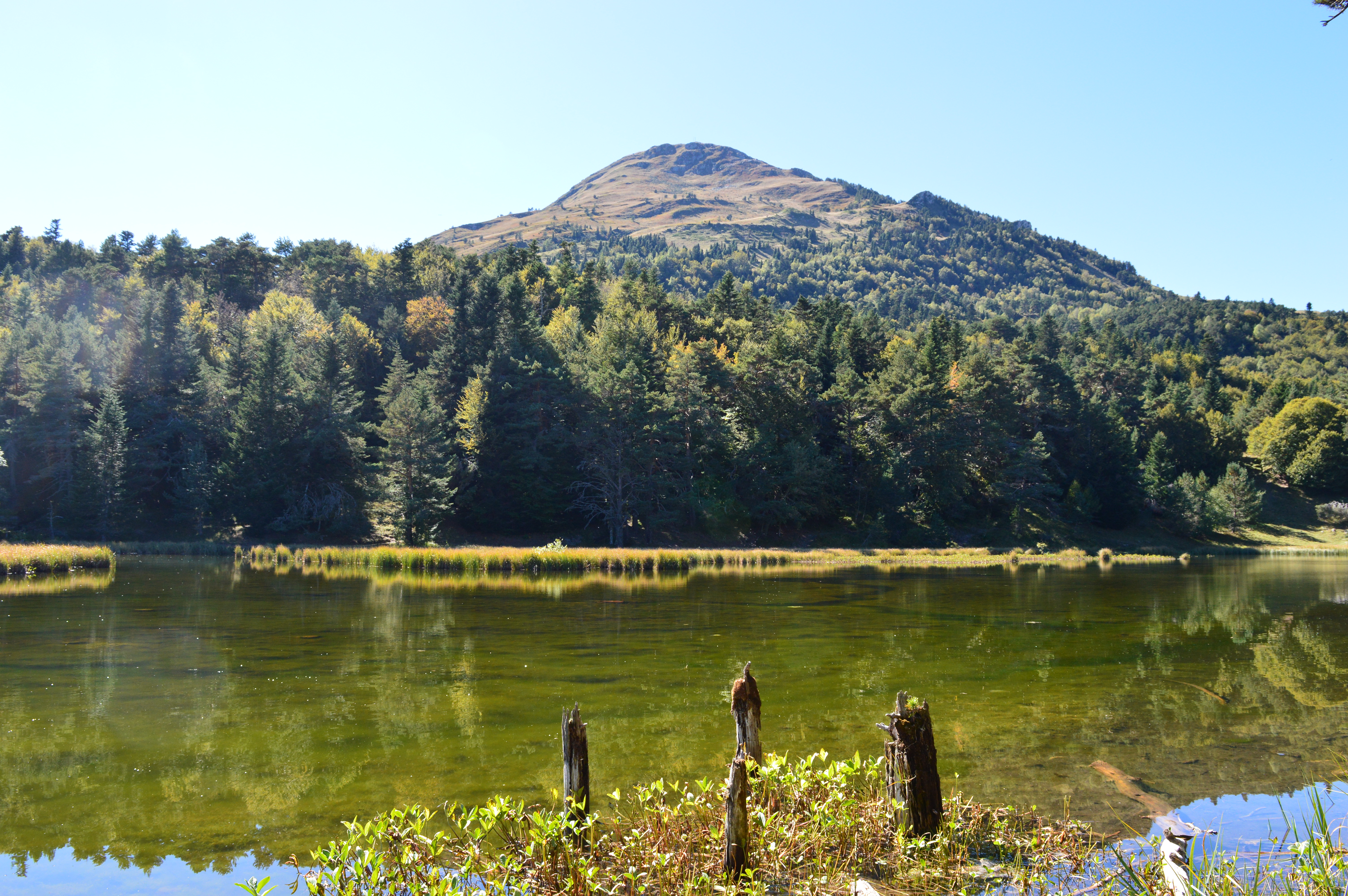 Vista de la Bassa d'Oles y el pico del Montcorbison